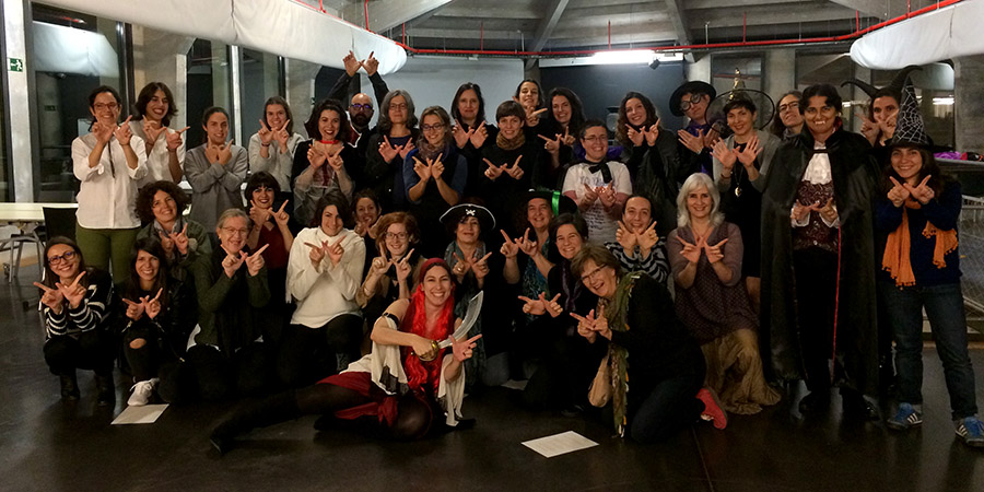 Foto de grupo de la editatona nocturna organizada sobre brujas para la Noche de Muertos organizada en Medialab-Prado por el grupo de trabajo Wikiesfera.